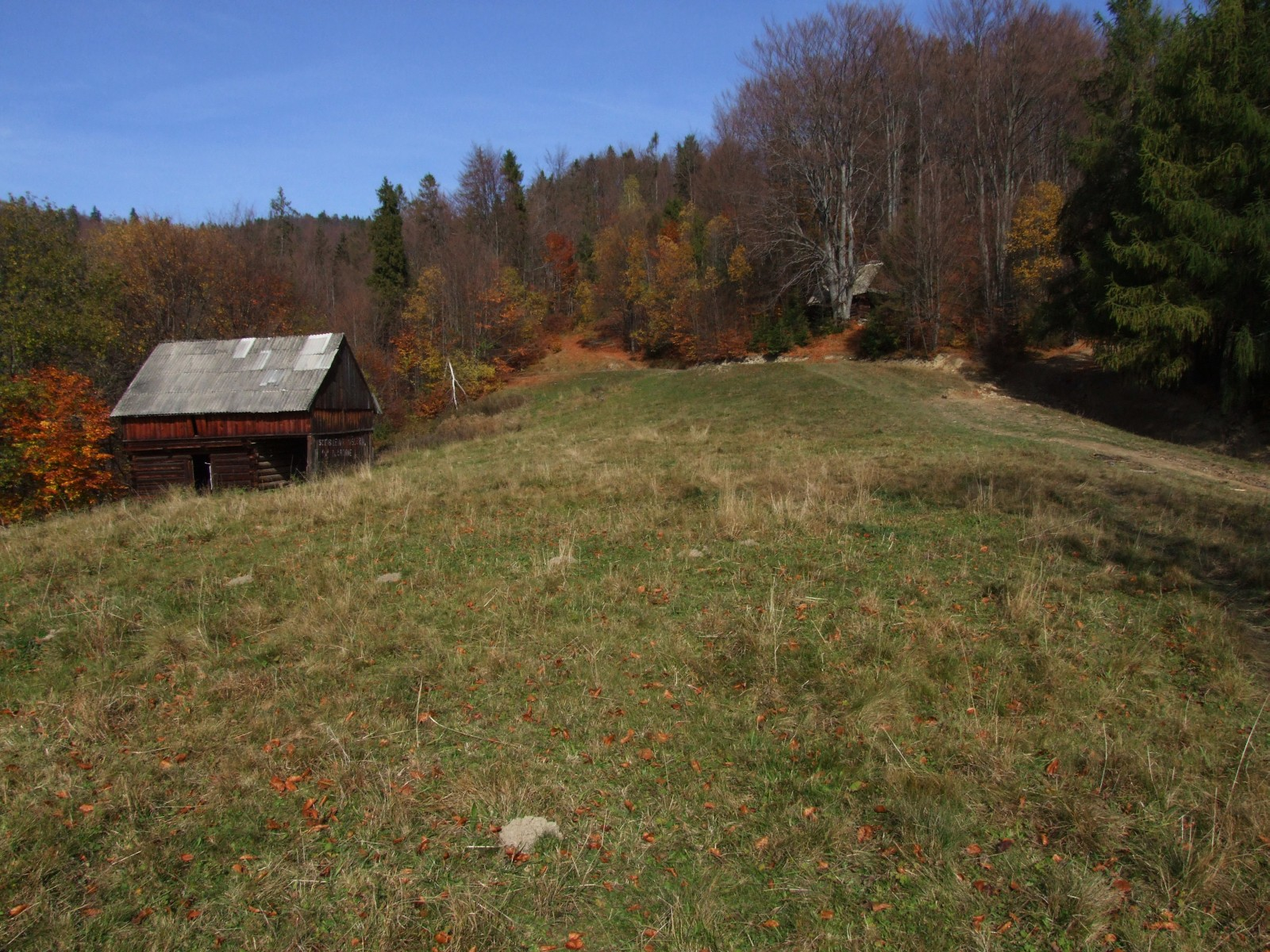 Polana Chowańcowa w Gorcach